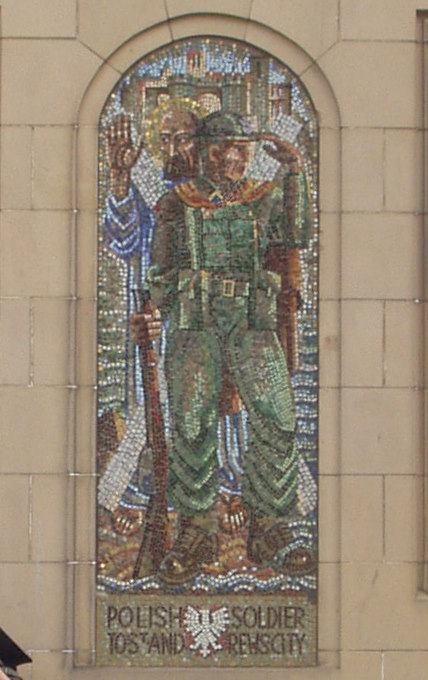 St.Andrews. Mozaika (żołnierz polski z patronem miasta Św.Andrzejem).